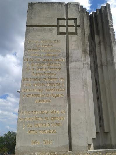 Monumento en homenaja a los caídos de abril de 1954.